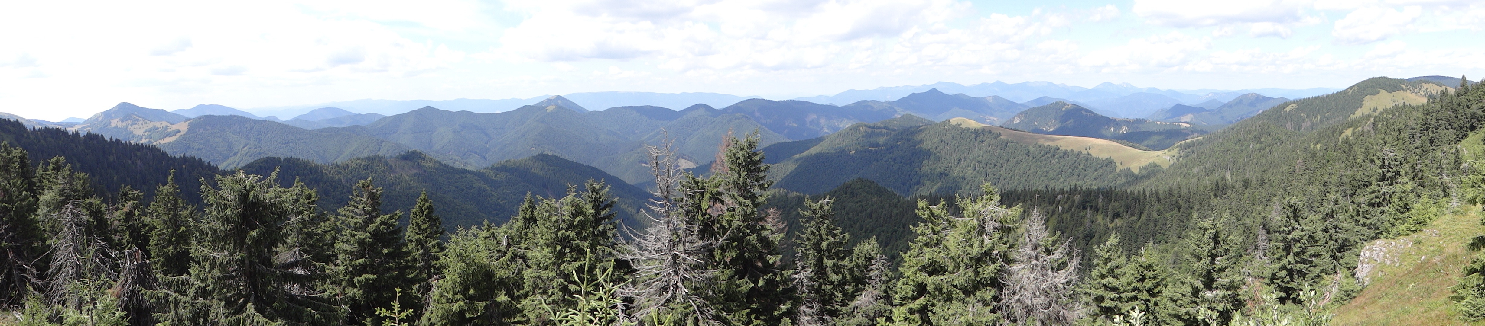 View from Tanečnica